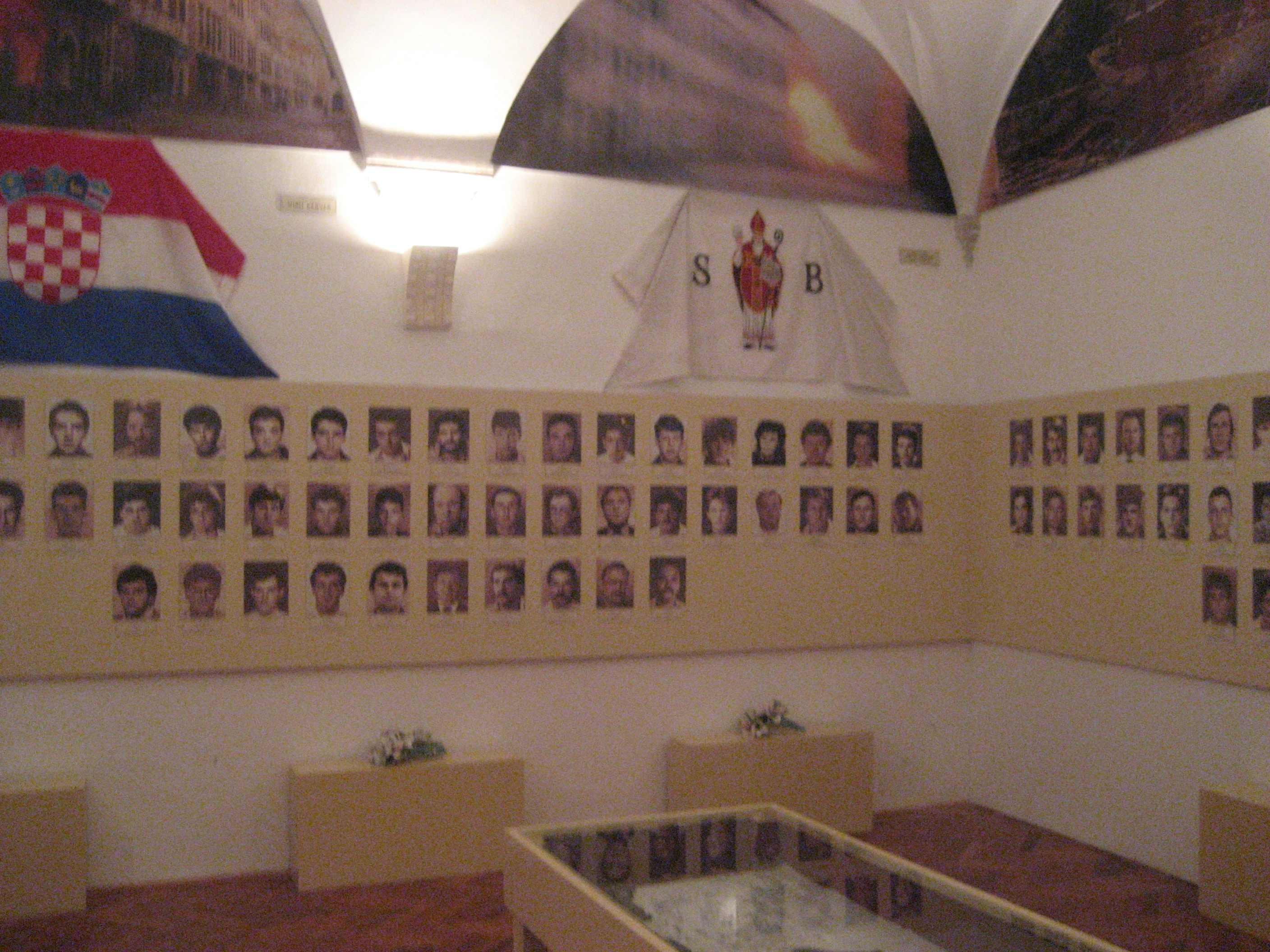 Dubrovnik Defense Memorial